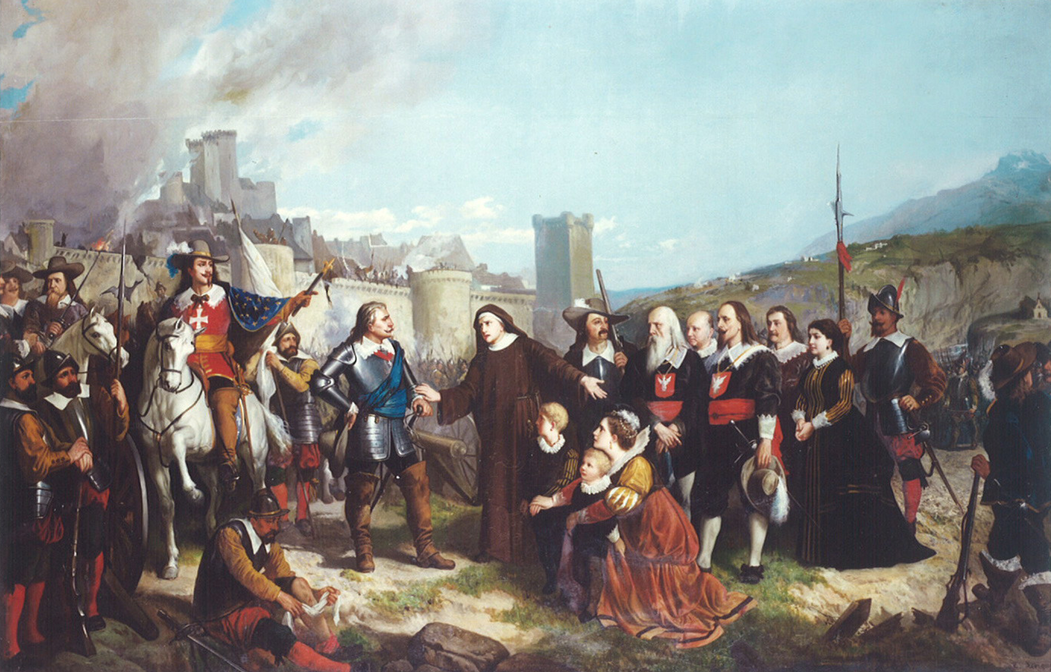 Le siège de Rumilly et l'intercession des Bernardines, le 23 mai 1630 ; tableau de Théodore Levigne, 1873, conservé à l'hôtel de ville de Rumilly.